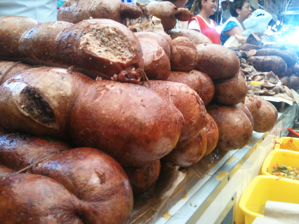 «Obispo»: embutido típico de Tenancingo de Degollado (México).